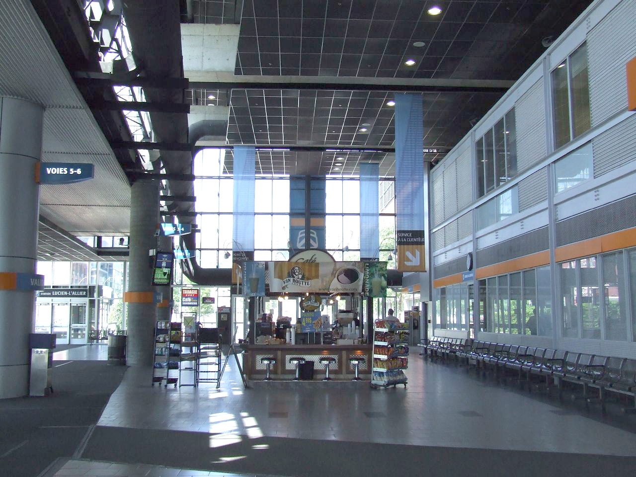 Gare Lucien-L'Allier